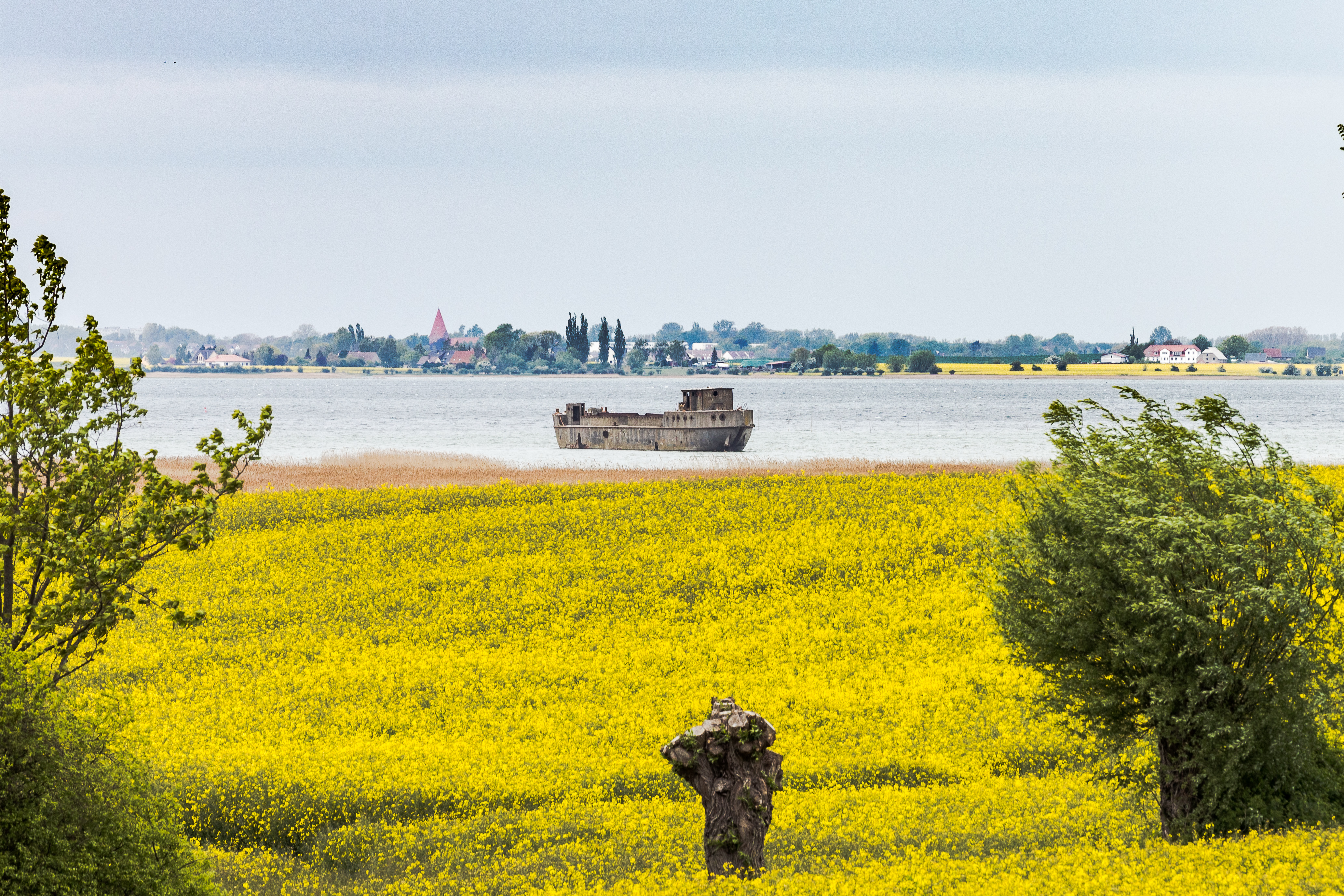 Gestrandetes Betonschiff in der Wismarer Bucht (Ostsee) vor Redentin, gesehen vom Gewerbegebiet Wismar